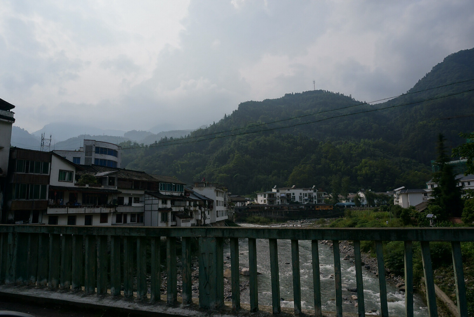 大邑縣西嶺鎮